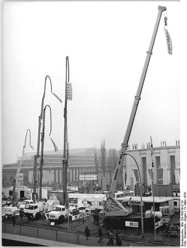 Leipzig, Frühjahrsmesse, Autokräne ADN-ZB Sindermann 16.3.76 Leipzig:Frühjahrsmesse 76- Mit einem starken Angebot in fast allen Technik- und Konsumgüterbranchen sind bekannte Firman aus der BRD vertreten. In der Branche Förder- und Hebetechnik offeriert das Unternehmen DEMAG-Hauptmaschinen u.a. diesen Autokran.